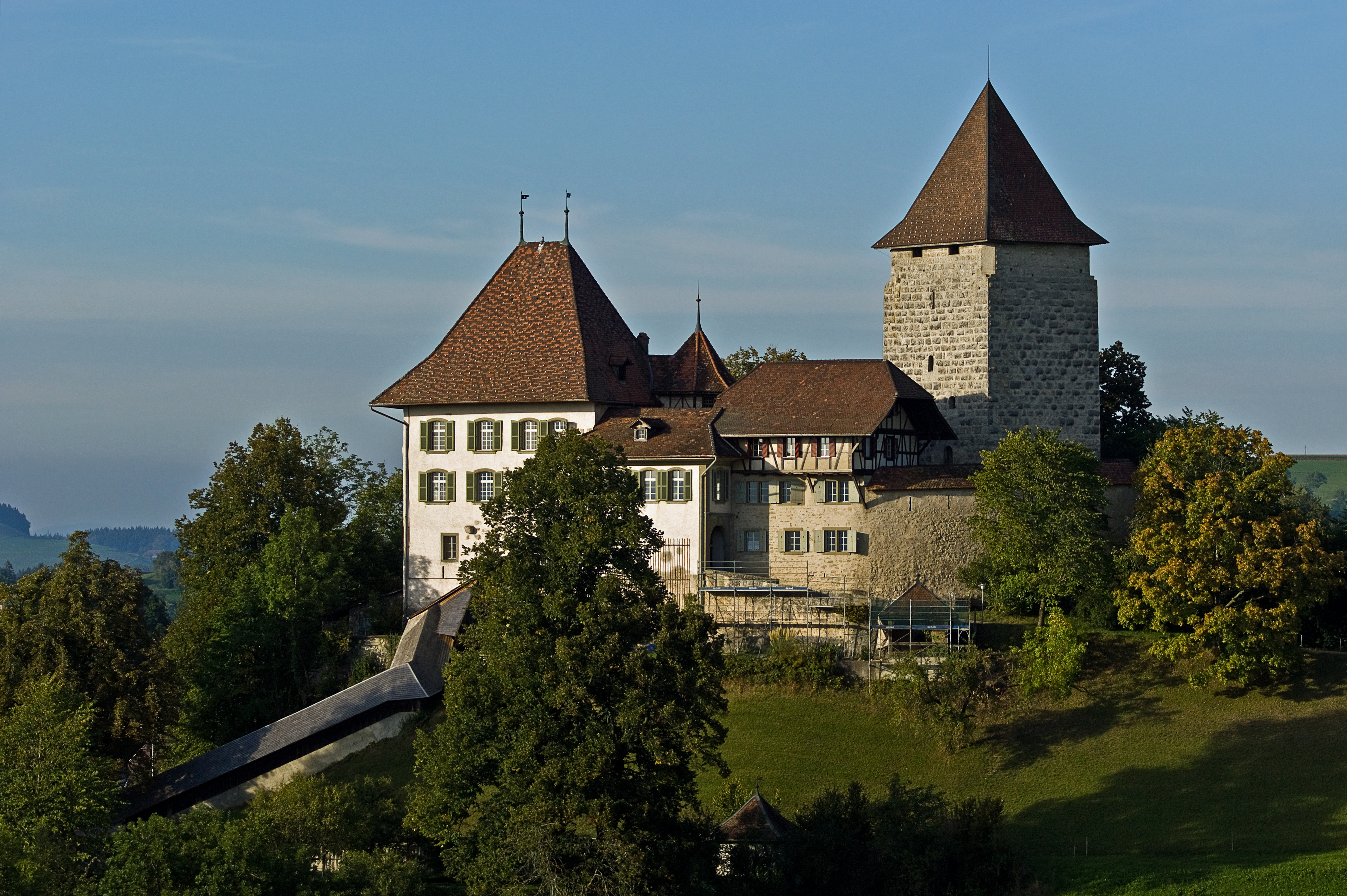 Schloss Trachselwald im Kanton Bern